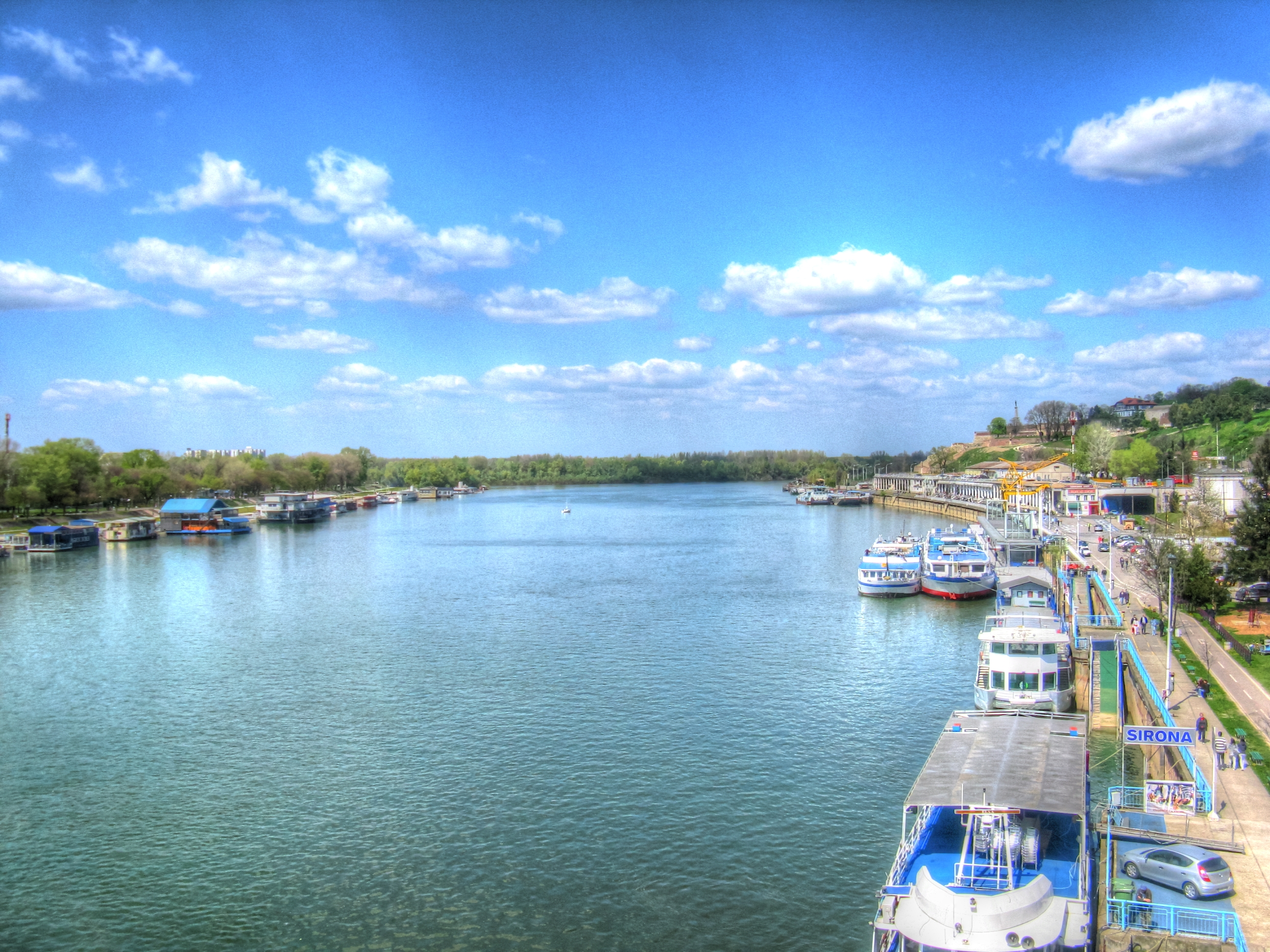 Pristaniste